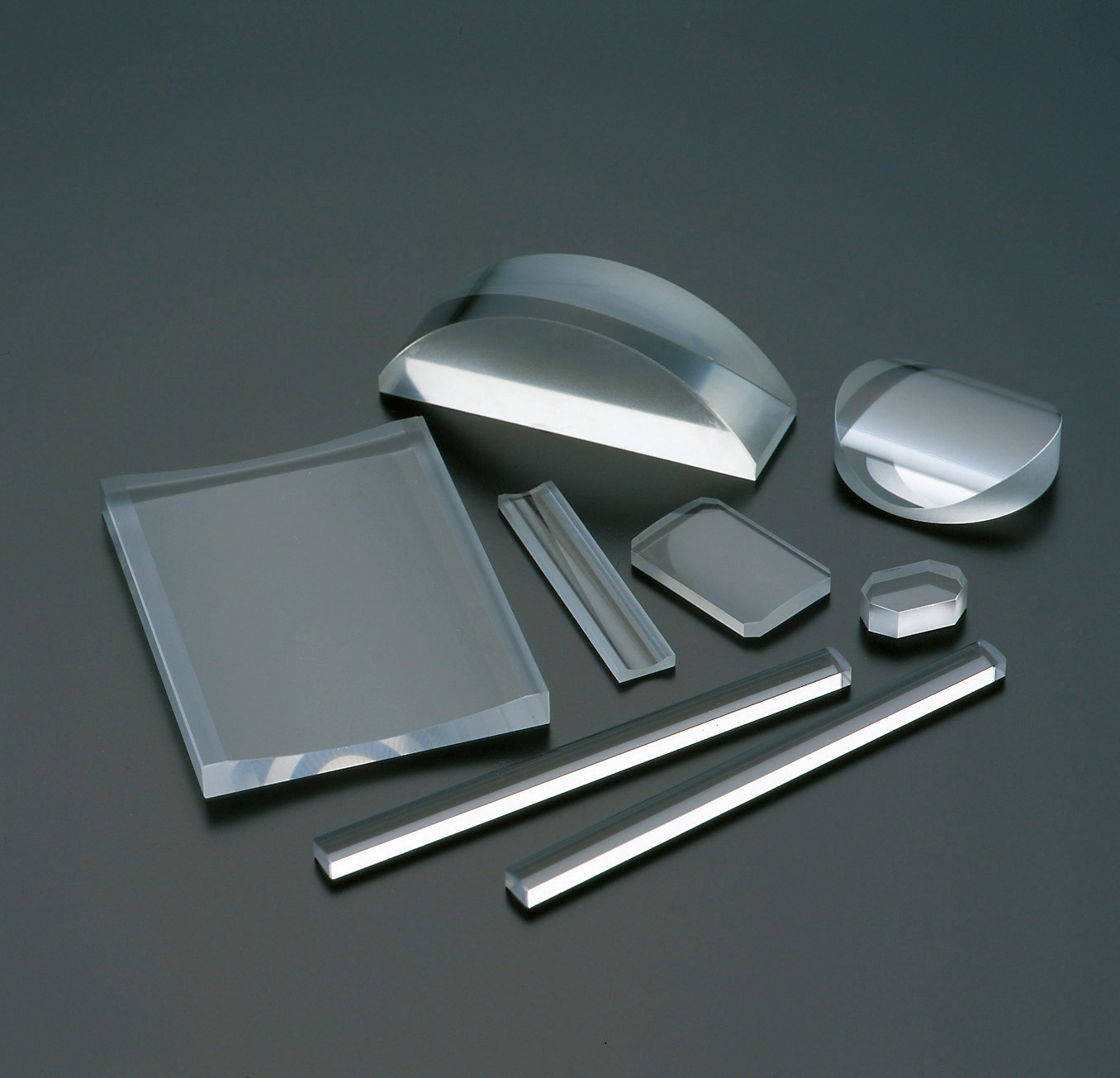 シリンドリカルレンズ写真